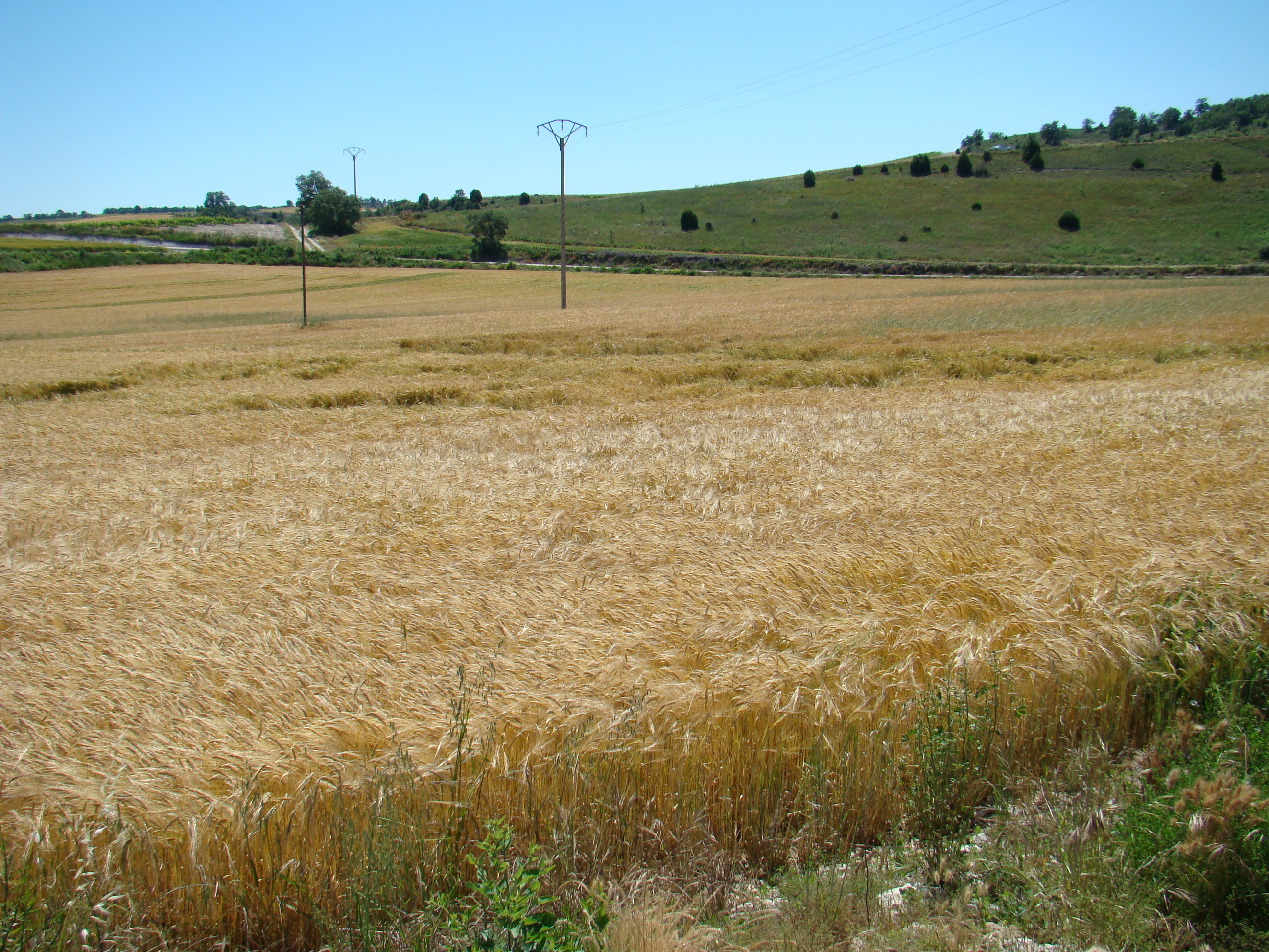 Valbuena de Duero, Valladolid, España. Monasterio de Santa María de Valbuena. Campos de cereal.